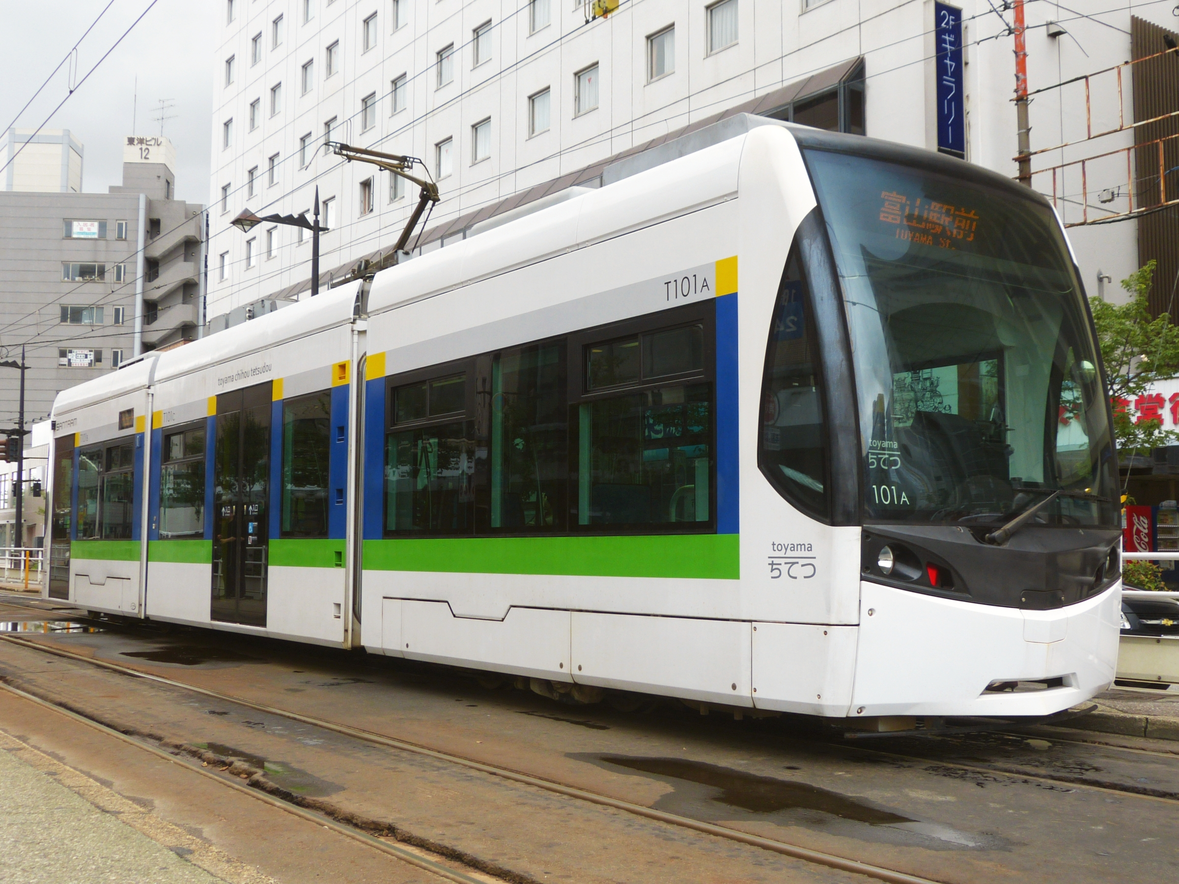 富山地方鉄道T100形。富山駅前にて撮影。